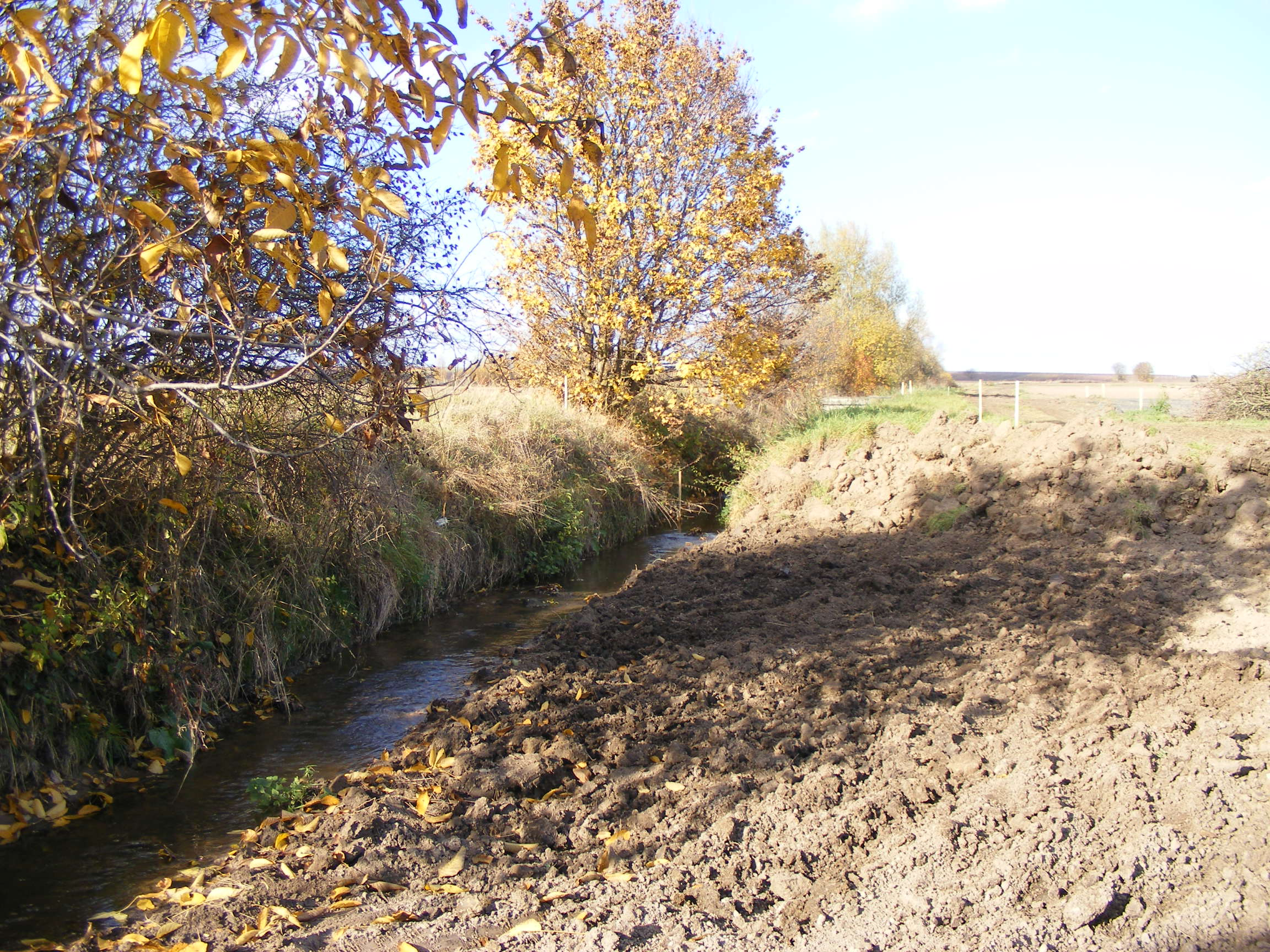 Renaturierung des Floßbachs in Dirmstein: Abflachung des Steilufers